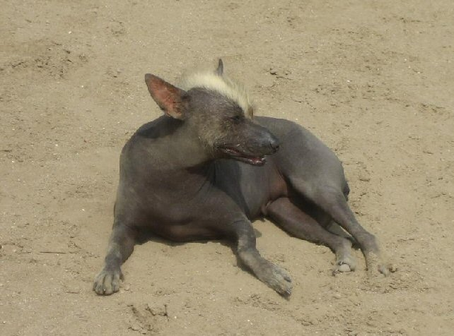 Peruvian hairless dog - Perro sin pelo del Peru (Trujillo, Peru).